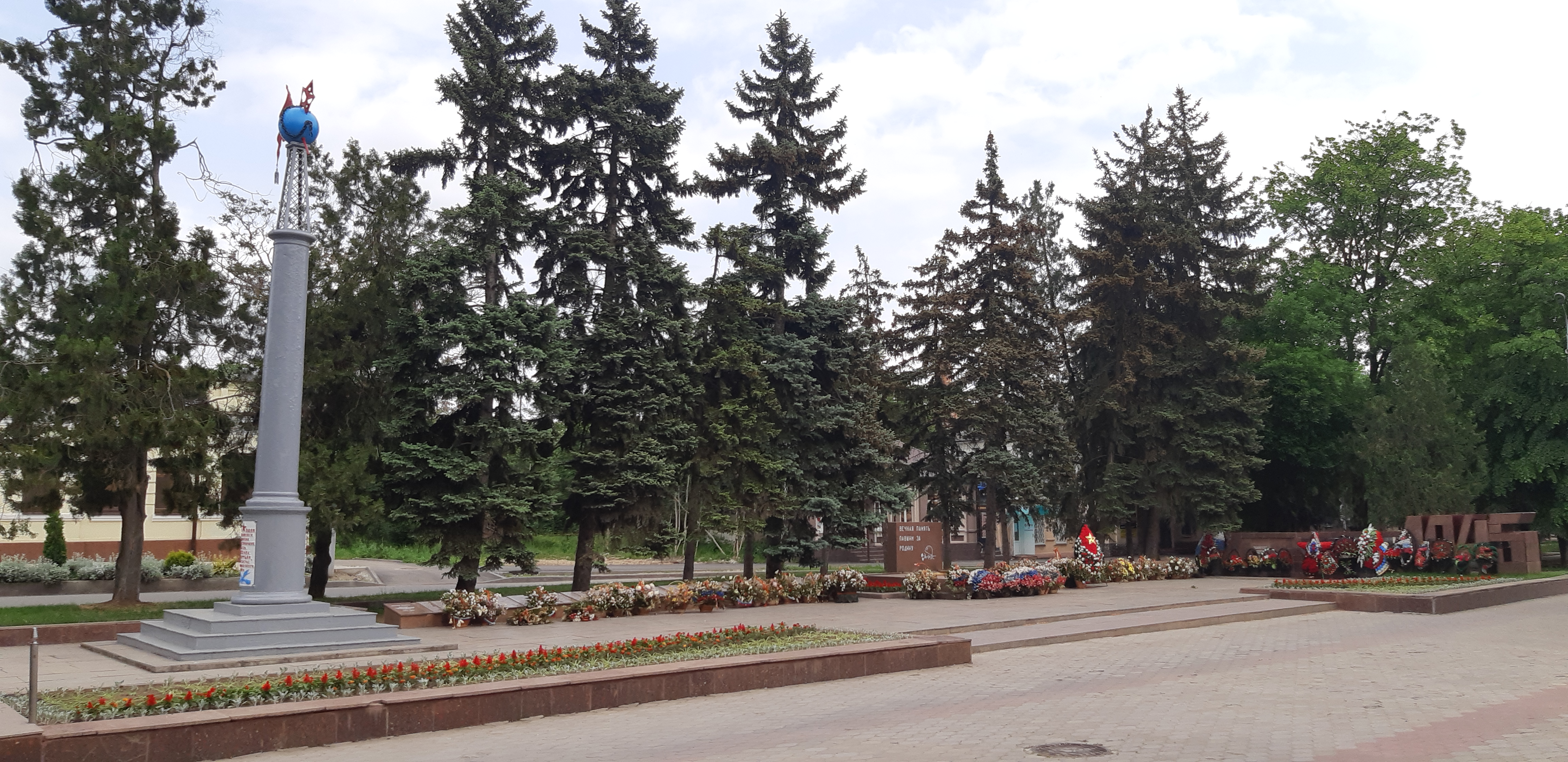 Мемориал Вечный огонь и памятник красноармейцам